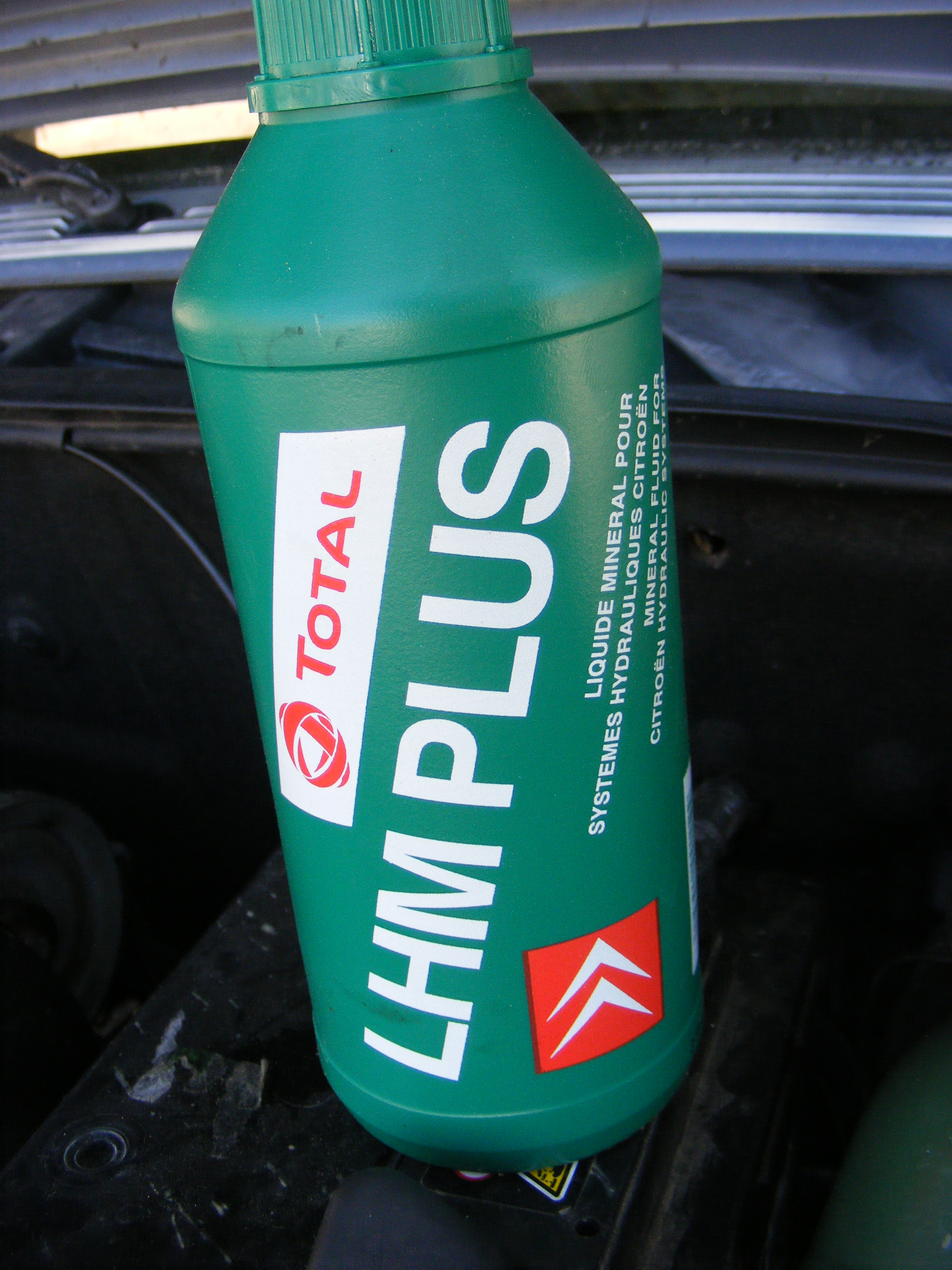 Bidon de LHM de marque Total